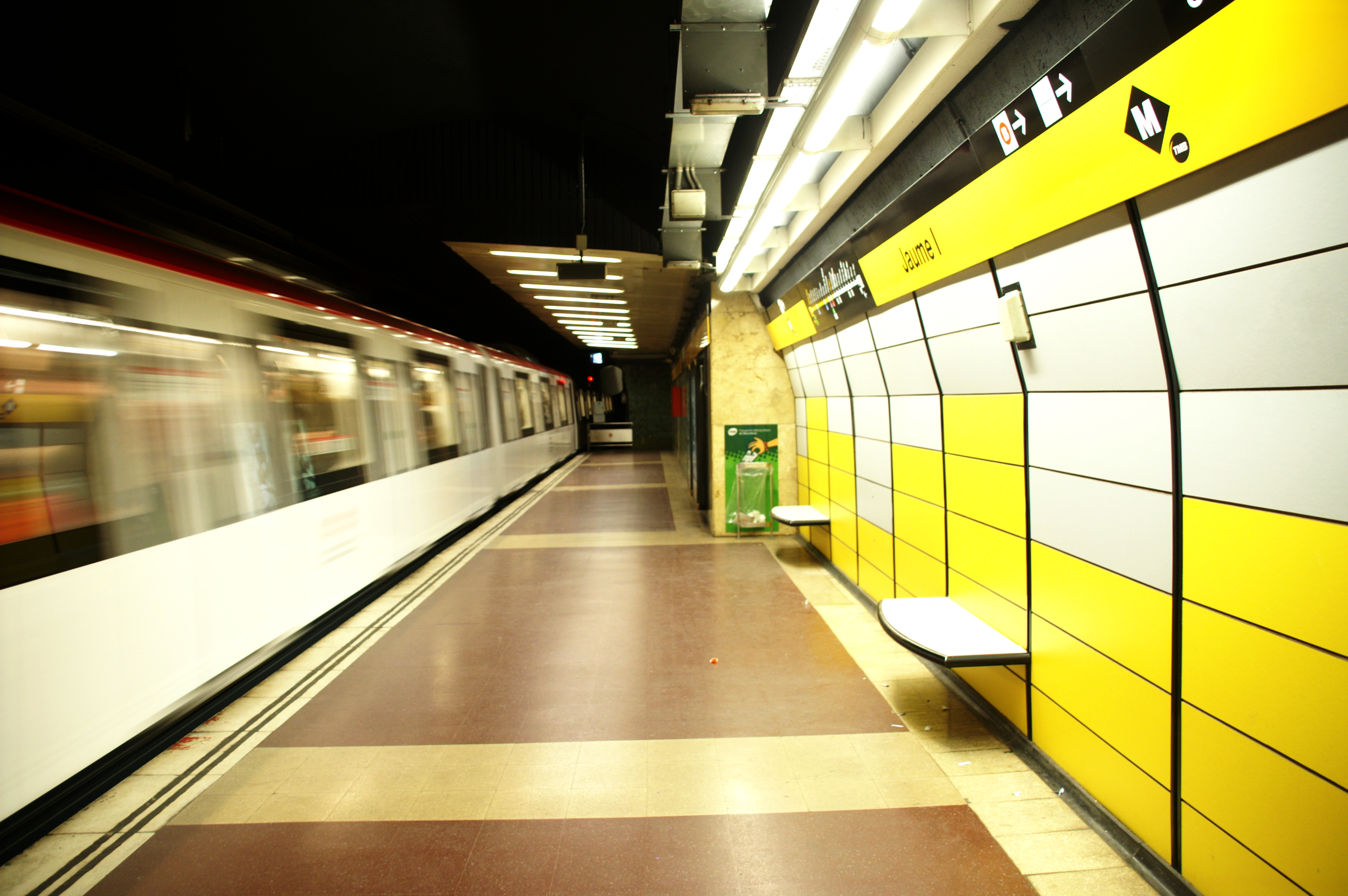 Metrostation Jaume I, Barcelona